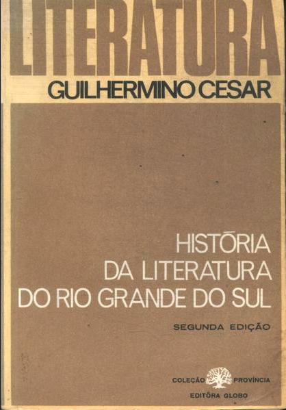 Capa do livro História da Literatura do Rio Grande do Sul de Guilhermino César